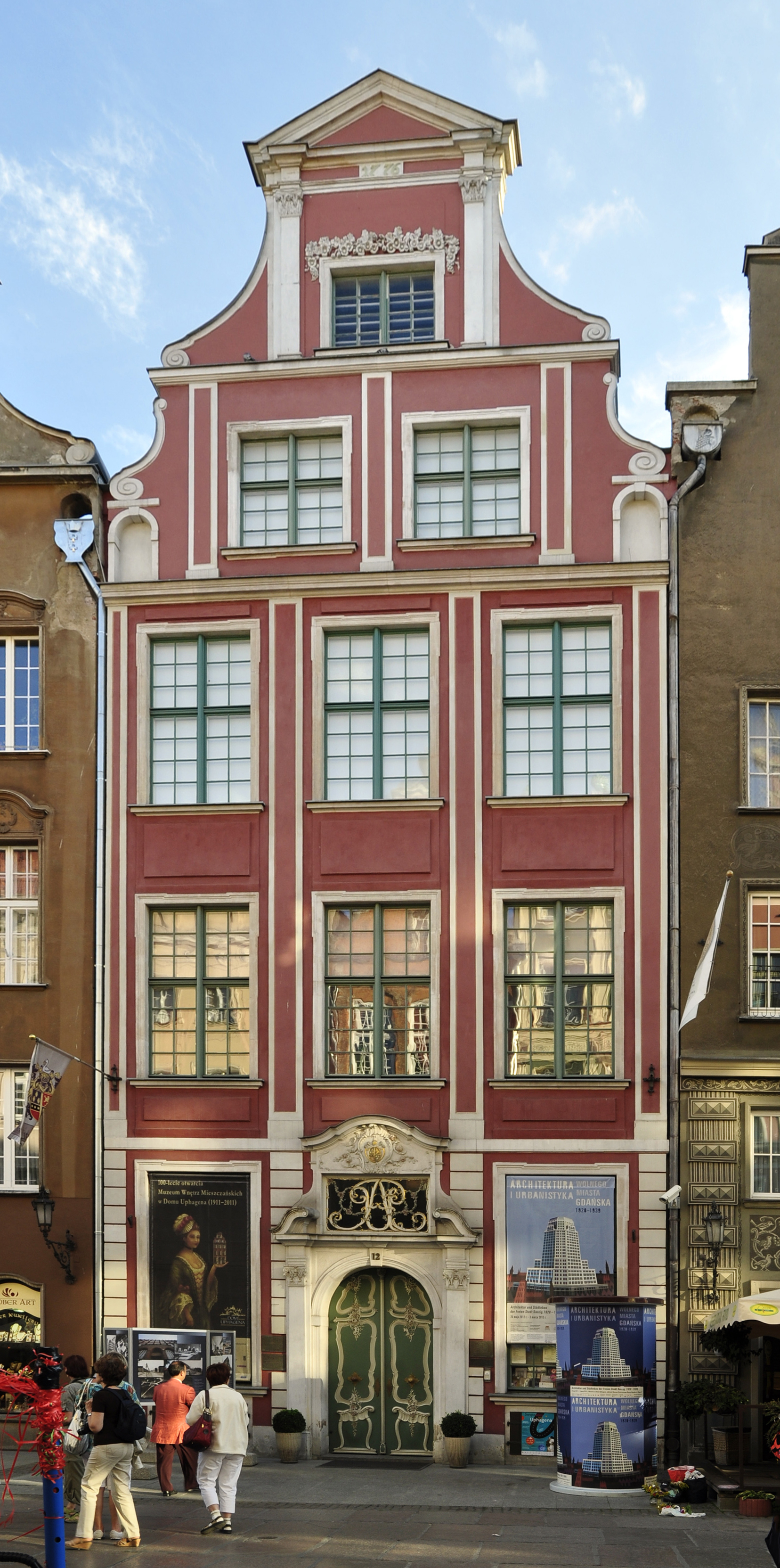 Gdańsk Główne Miasto, ul. Długa 12